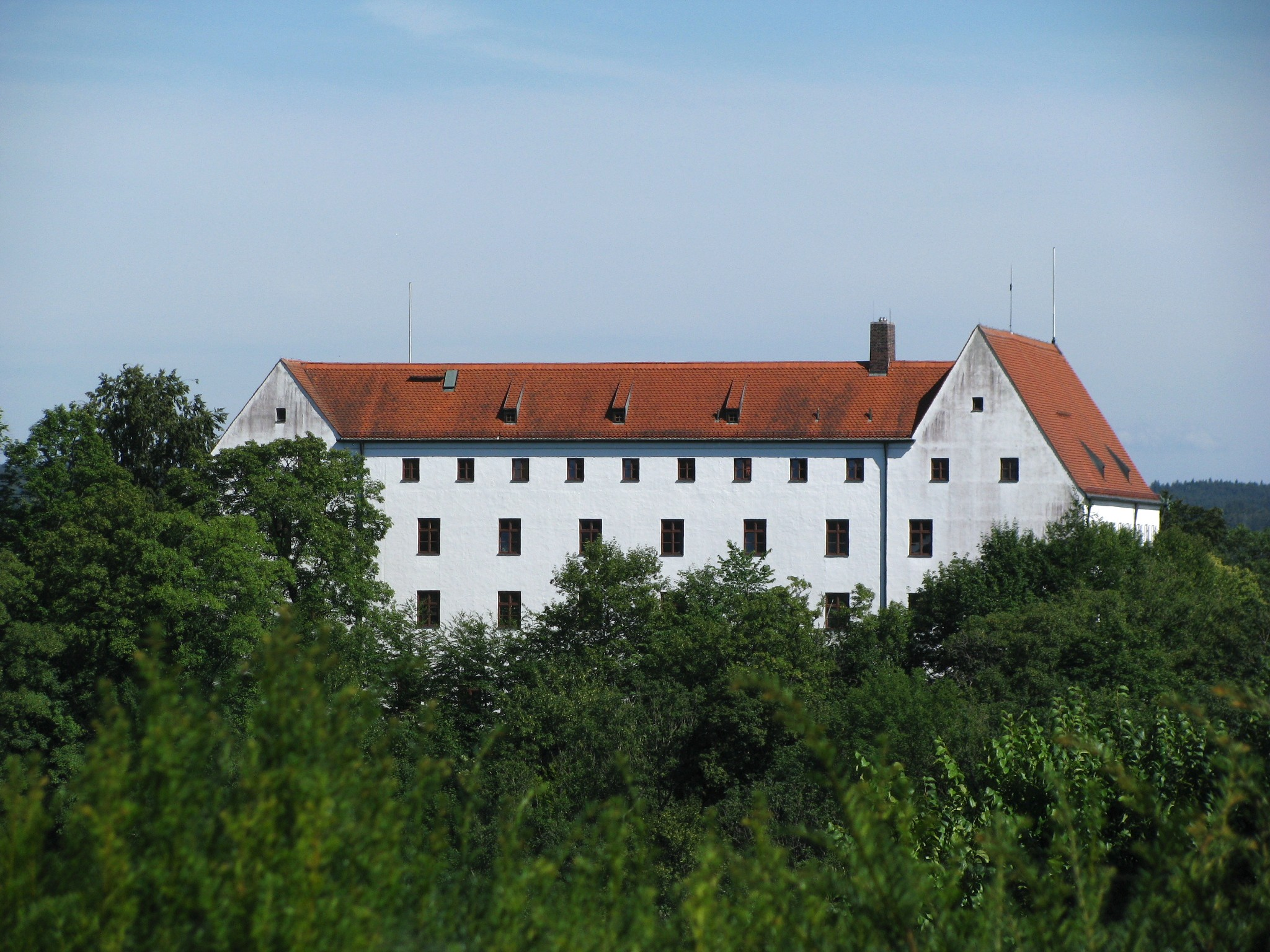 Schloss Starnberg von Nordwesten